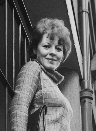 Kari Simonsen (født 1937) er en norsk skuespillerinne som er kjent både fra teater, film og TV.